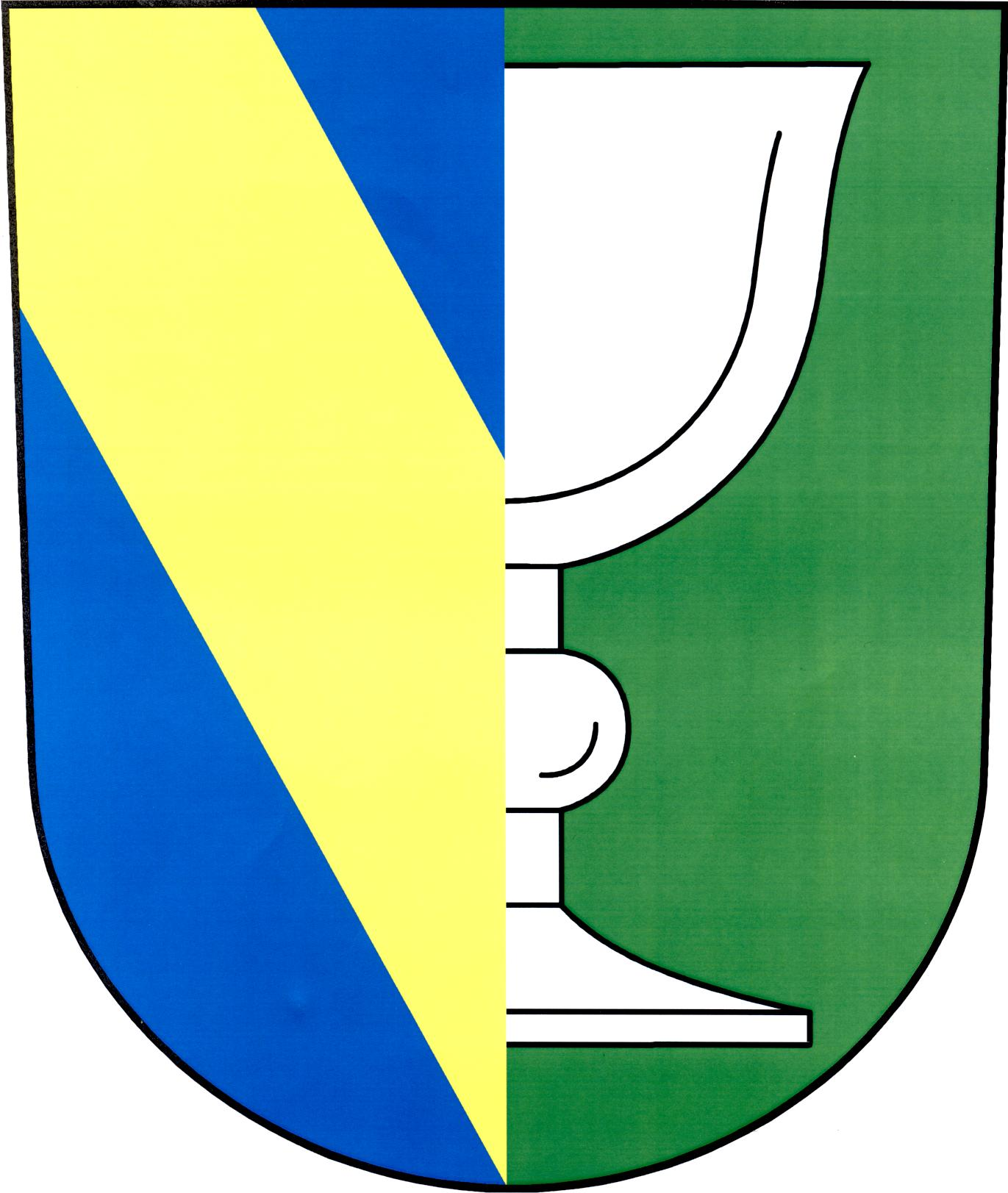 Znak obce Unkovice